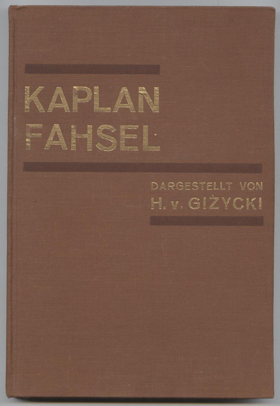 Helmut Fahsel, kath. Priester, Buchtitel, Biografie 1930